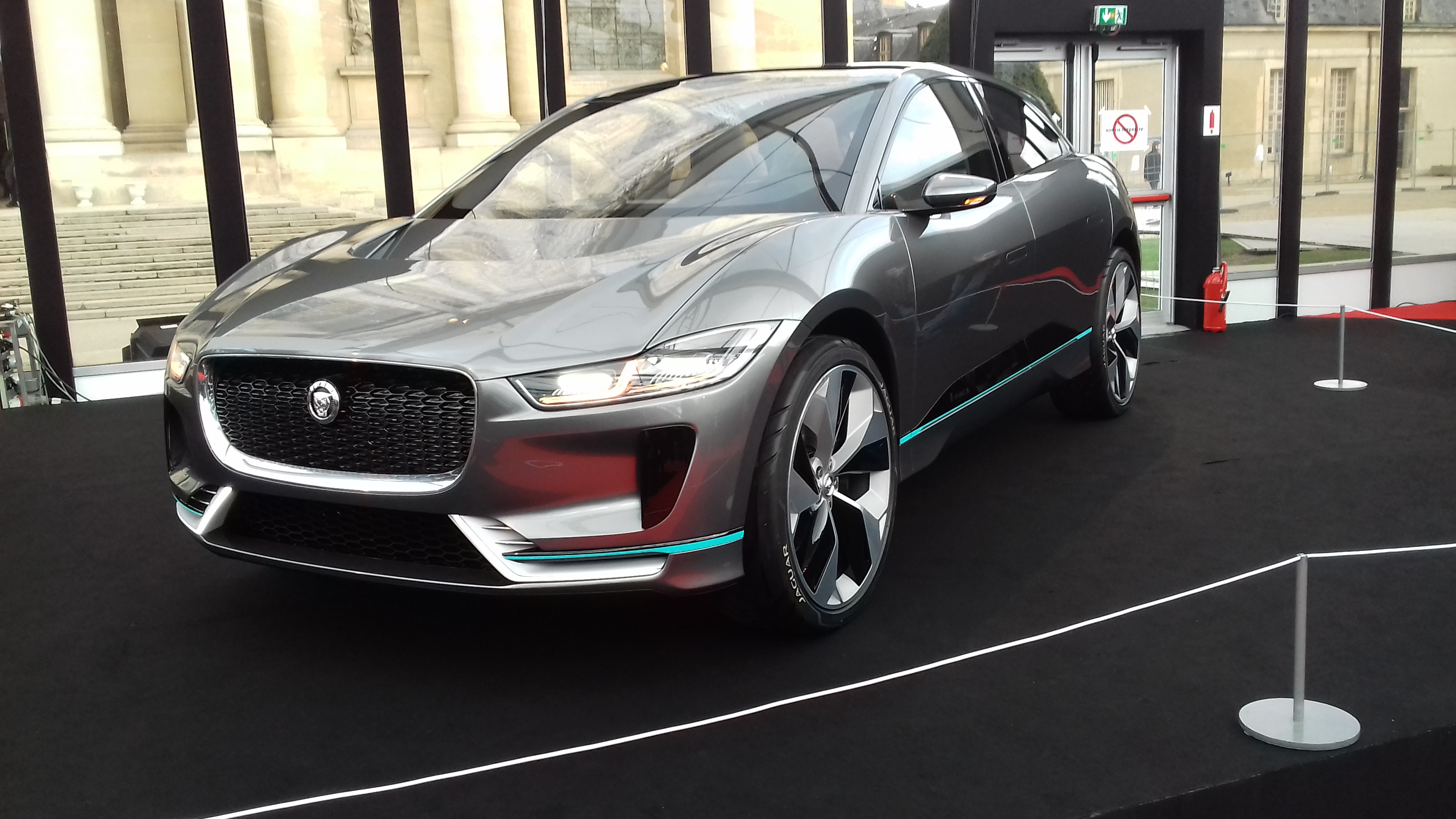 Jaguar I-Pace au Festival automobile international 2017